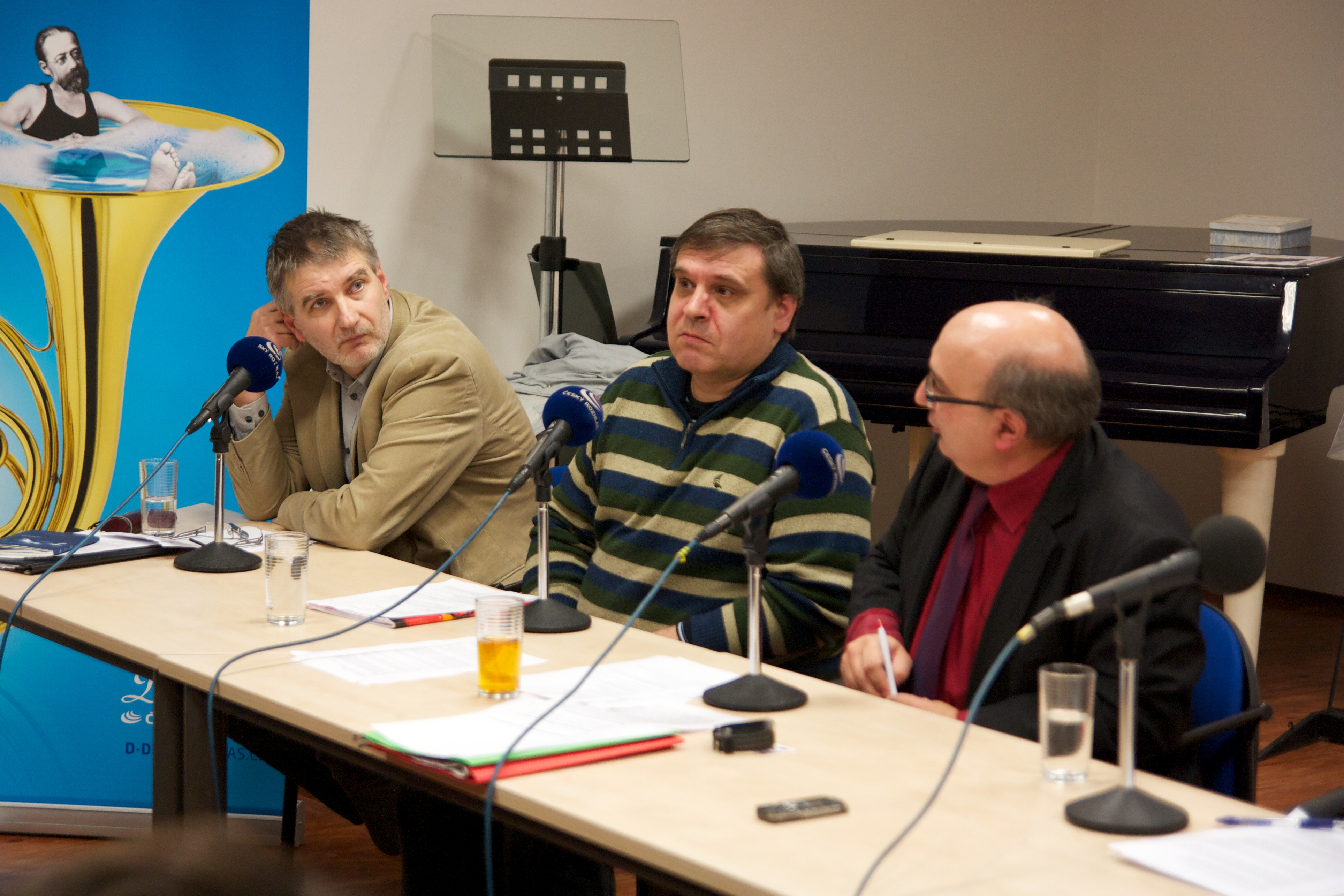 Jiří Trávníček / Jiří Zizler / Pavel Janáček